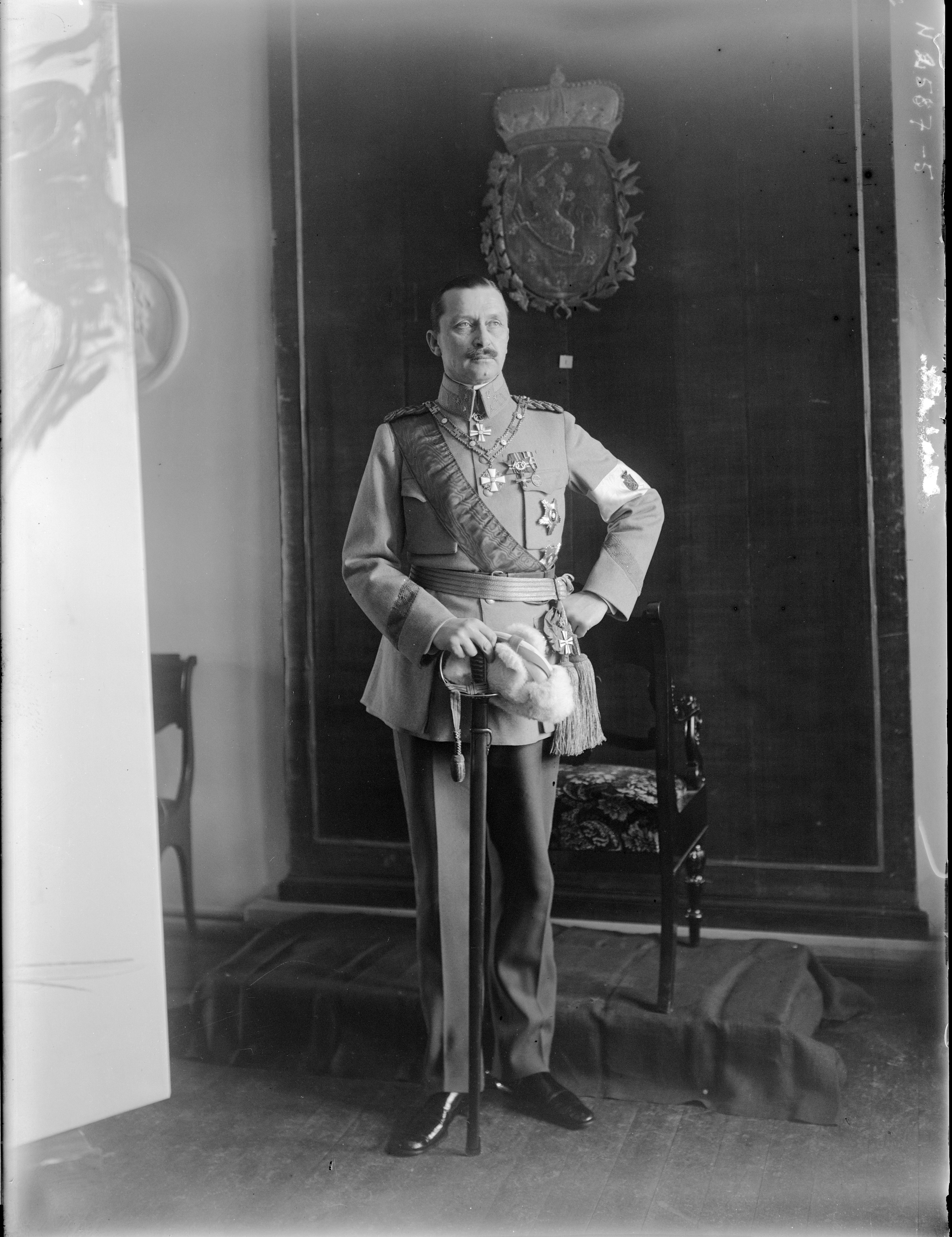 Atelier Eric Sundström: Regent of Finland C. G. E. Mannerheim, 1919, Helsinki. Digitized original negative. / Valtionhoitaja C. G. E. Mannerheim, 1919, Helsinki. Digitoitu alkuperäisestä negatiivista. The Finnish Museum of Photography / Suomen valokuvataiteen museo